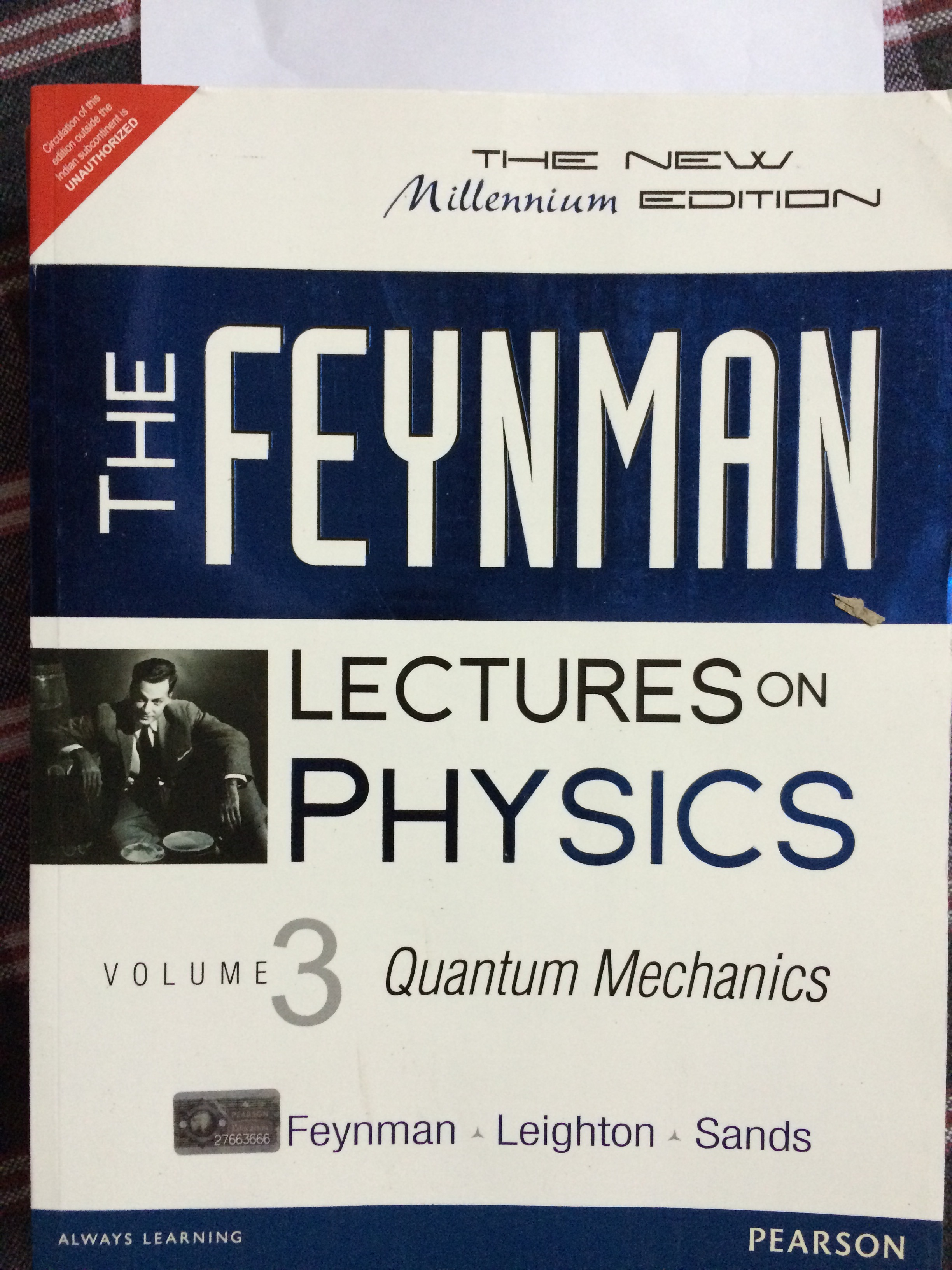 ਪੰਜਾਬੀ: ਵੌਲੀਊਮ 3